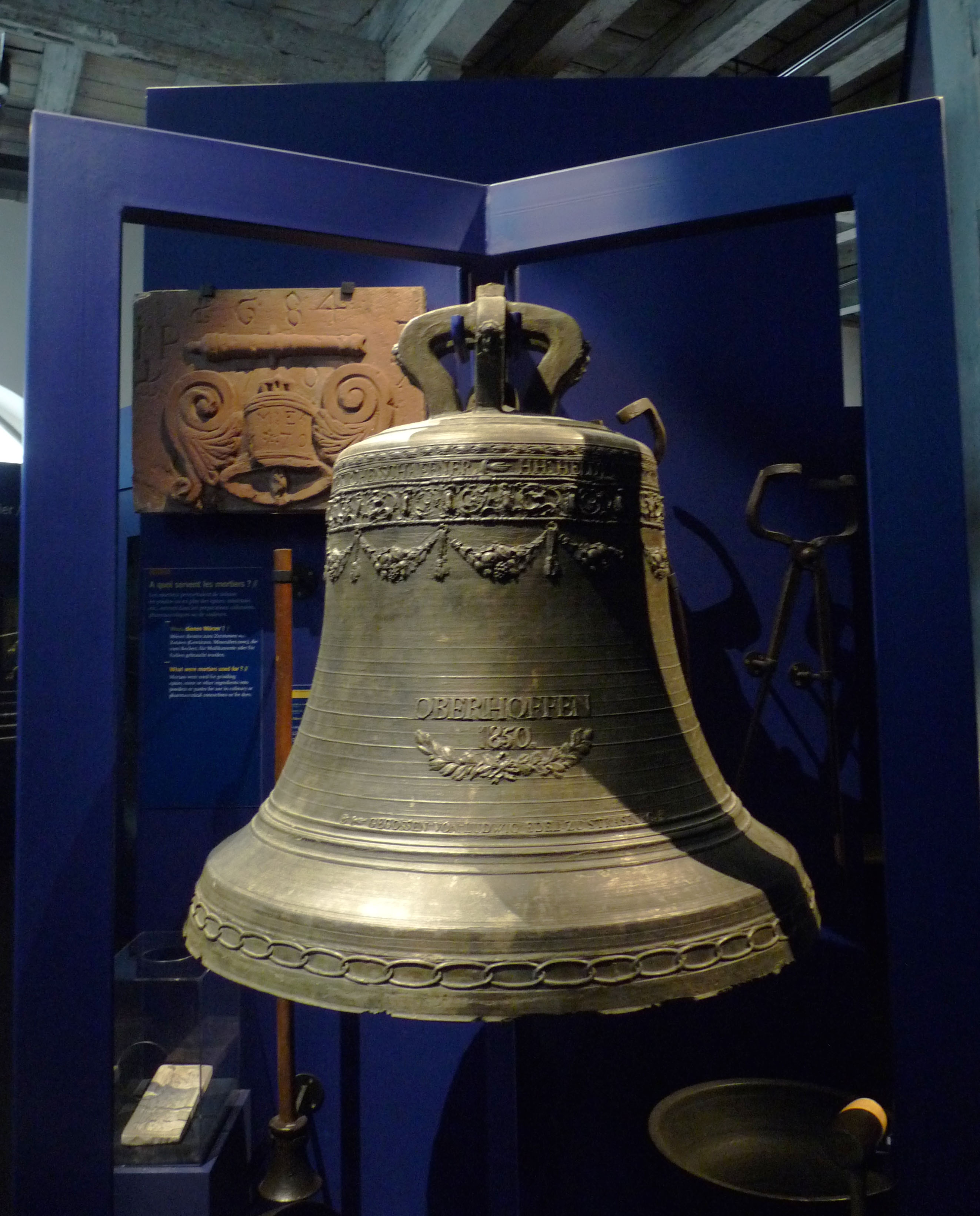 Cloche d'Oberhoffen-sur-Moder, Bas-Rhin (1850). Fondeur : Louis Edel (1810-1887). A l'arrière plan, à gauche, l'emblème en grès de la fonderie Edel (18e s.)